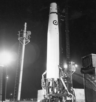 Un des 21 IRBM PGM-17 Thor de la RAF tiré depuis Vandenberg AFB sur un pas de tir. 60 Thor fut déployé dans le cadre du Project Emily en Angleterre de 1959 à 1963.